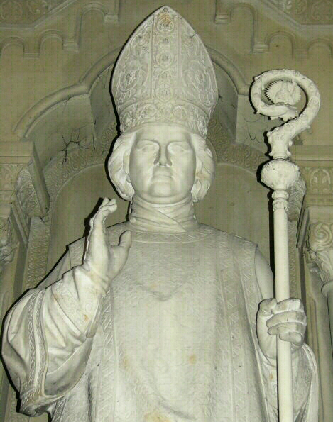 Darstellung des Bischofs Johann Valentin von Reißmann auf seinem Epitaph im Würzburger Dom